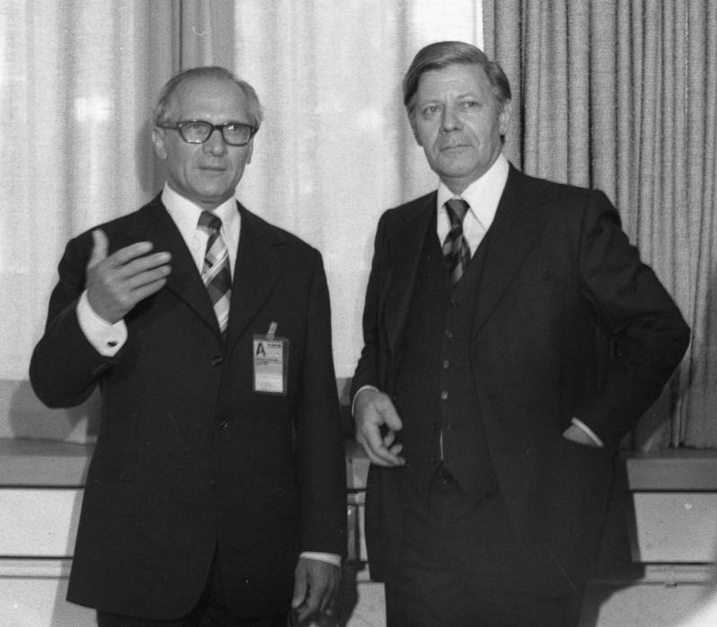 ADN-ZB/Demme/30.7.75/Helsinki: Sicherheitskonferenz: Der Erste Sekretär des ZK der SED, Erich Honecker (links) und BRD-Kanzler Helmut Schmidt trafen am 30.7.75 zu einem Gespräch zusammen.